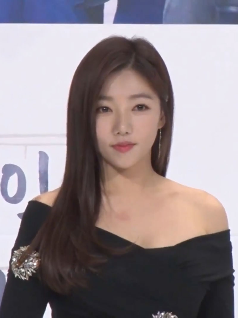 "청순과 섹시"...이유비-이채영, '출구없는 매력' #LeeYu-bi #LeeChaeYoung [디패짤]